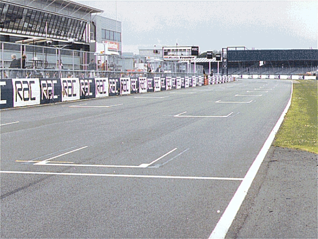 Start-/Zielgerade der Rennstrecke